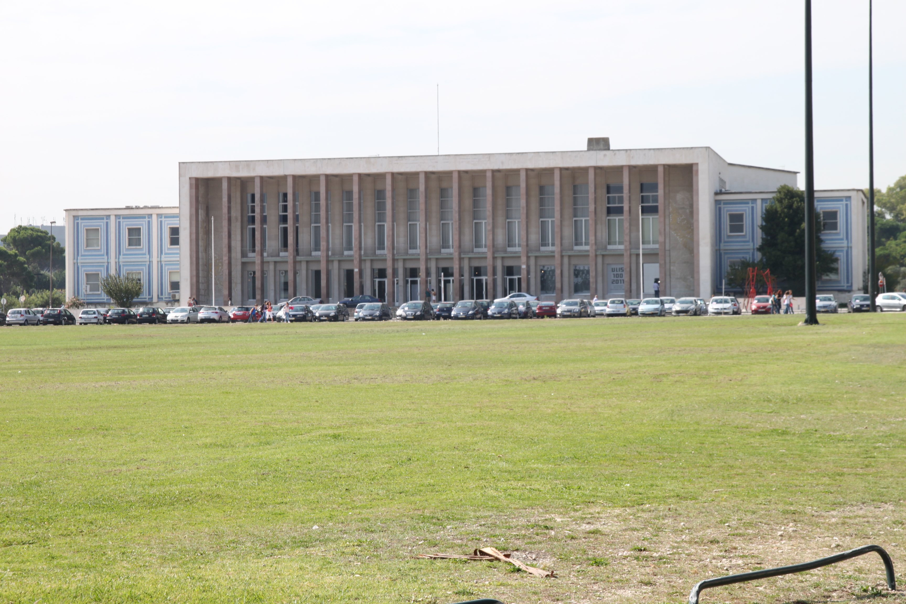 Reitoria da Universidade de Lisboa / Aula Magna This file was uploaded for Wiki Loves Monuments in Portugal with the unique identifier 97007780.